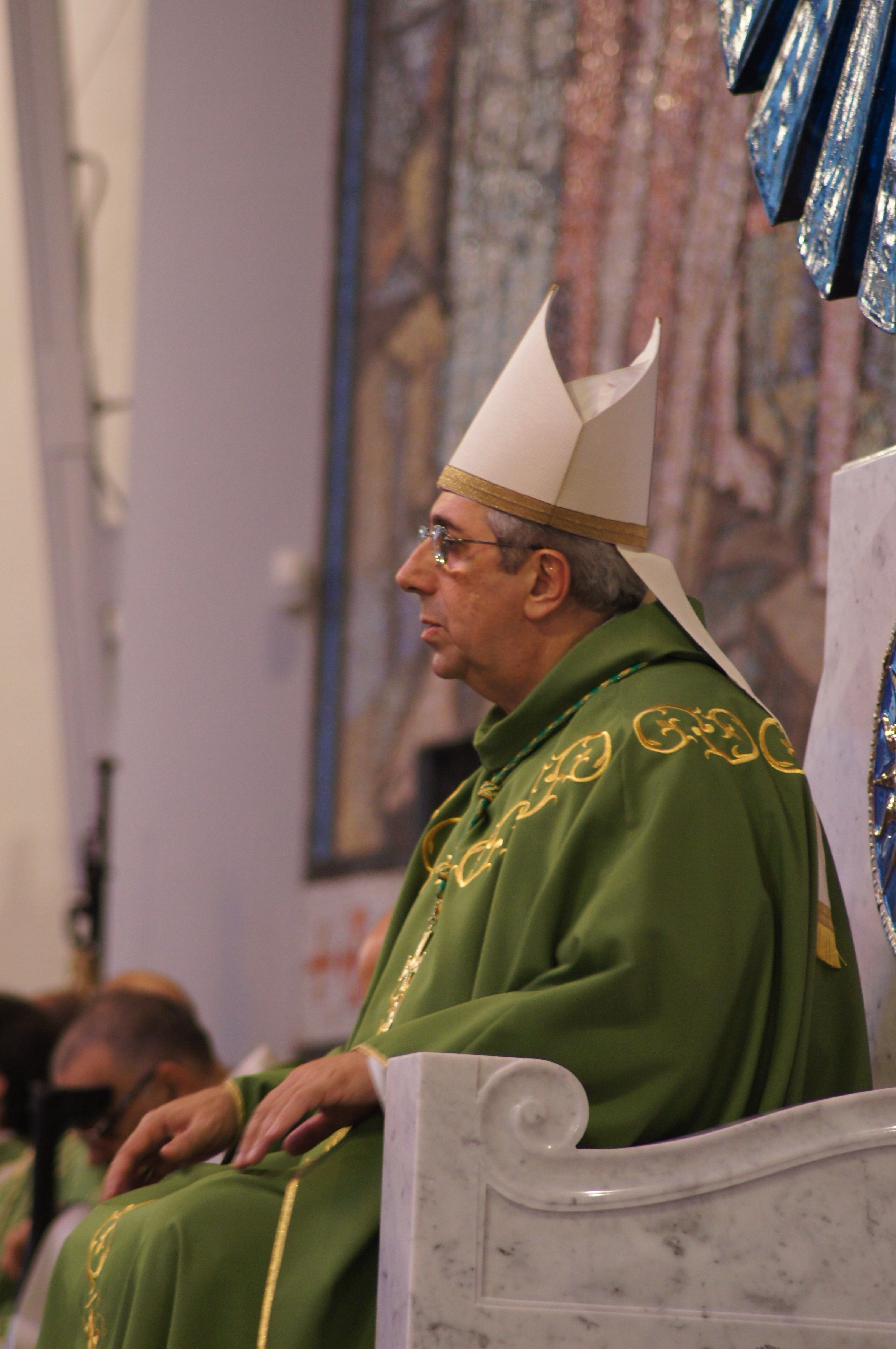 Monsignor Giuseppe Satriano, Arcivescovo di Rossano-Cariati durante un omelia al Santuario di San Francesco di Paola a Paola